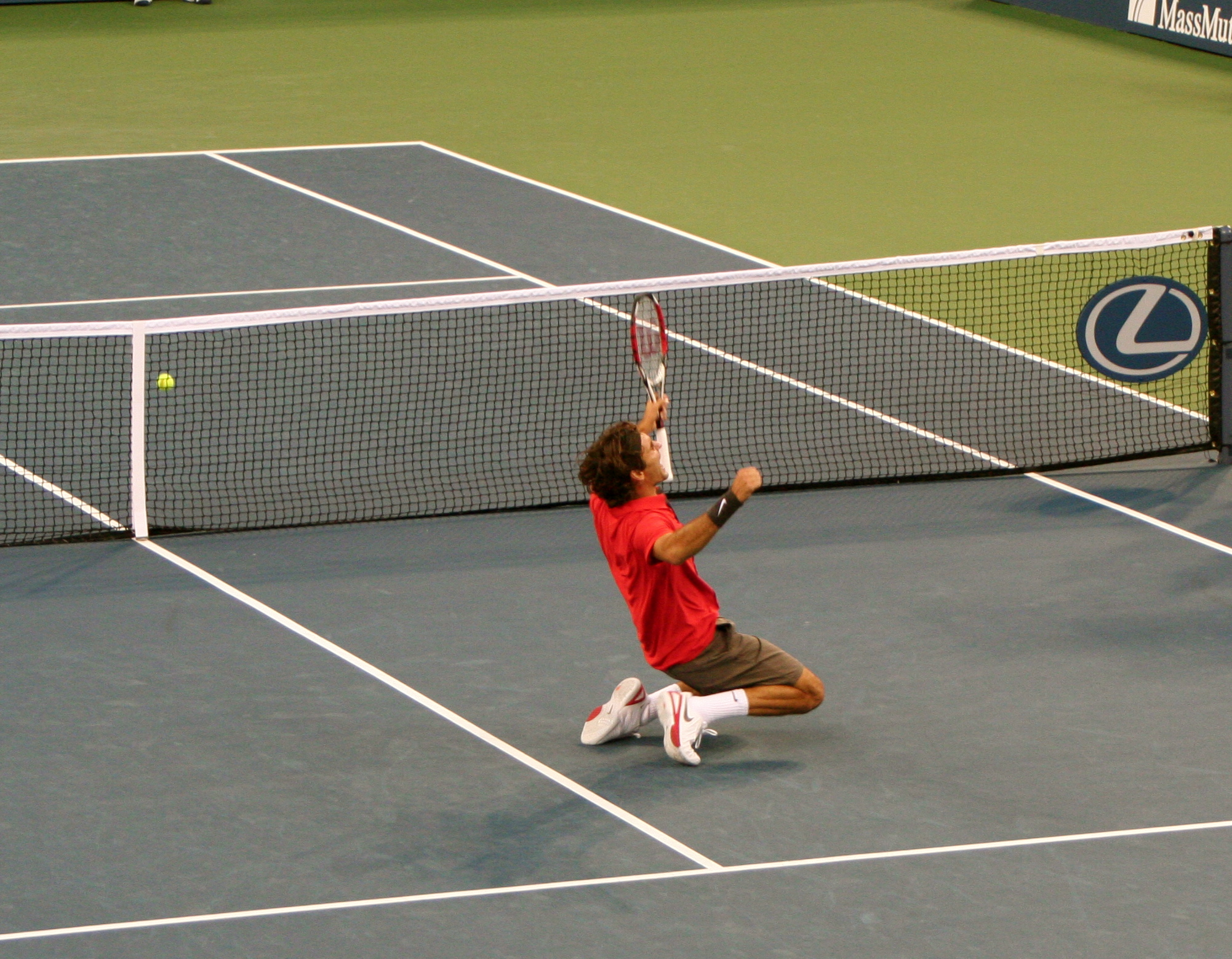 Roger Federer wins the US Open 2008